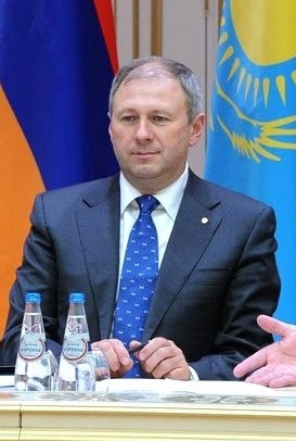 Заместитель Премьер-министра Белоруссии Сергей Румас